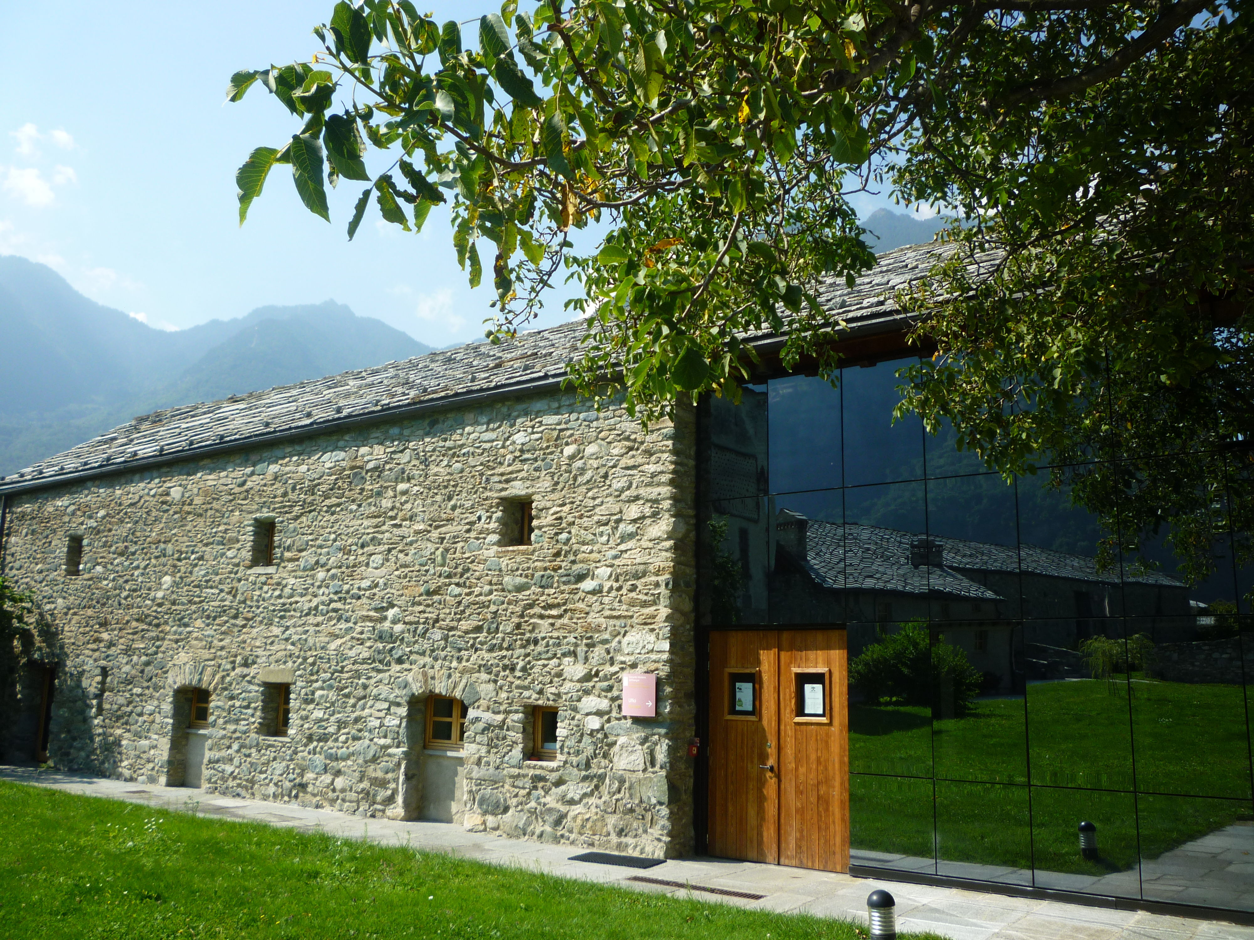 Le siège de la communauté de montagne Évançon au centre de la Murasse, à Verrès (Vallée d'Aoste)